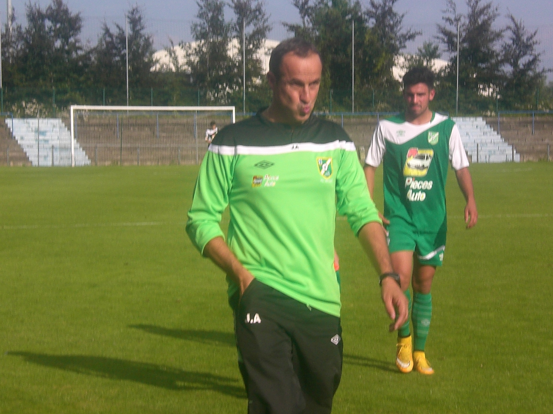 Jean Antunès lors du match RC Lens B / IC Croix, comptant pour la troisième journée du Championnat de France de football amateur (CFA), le 29 août 2015, au Stade François Blin d'Avion.